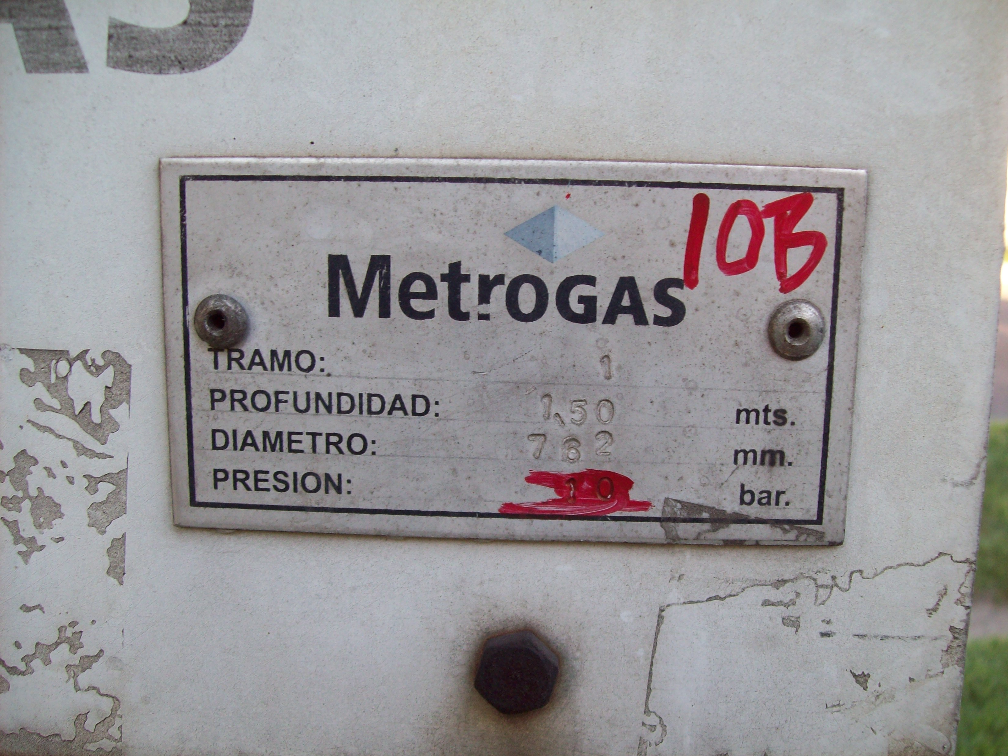 Remediación de gasoduto de 24" en la Avenida San Martín Florencio Varela, Argentina.